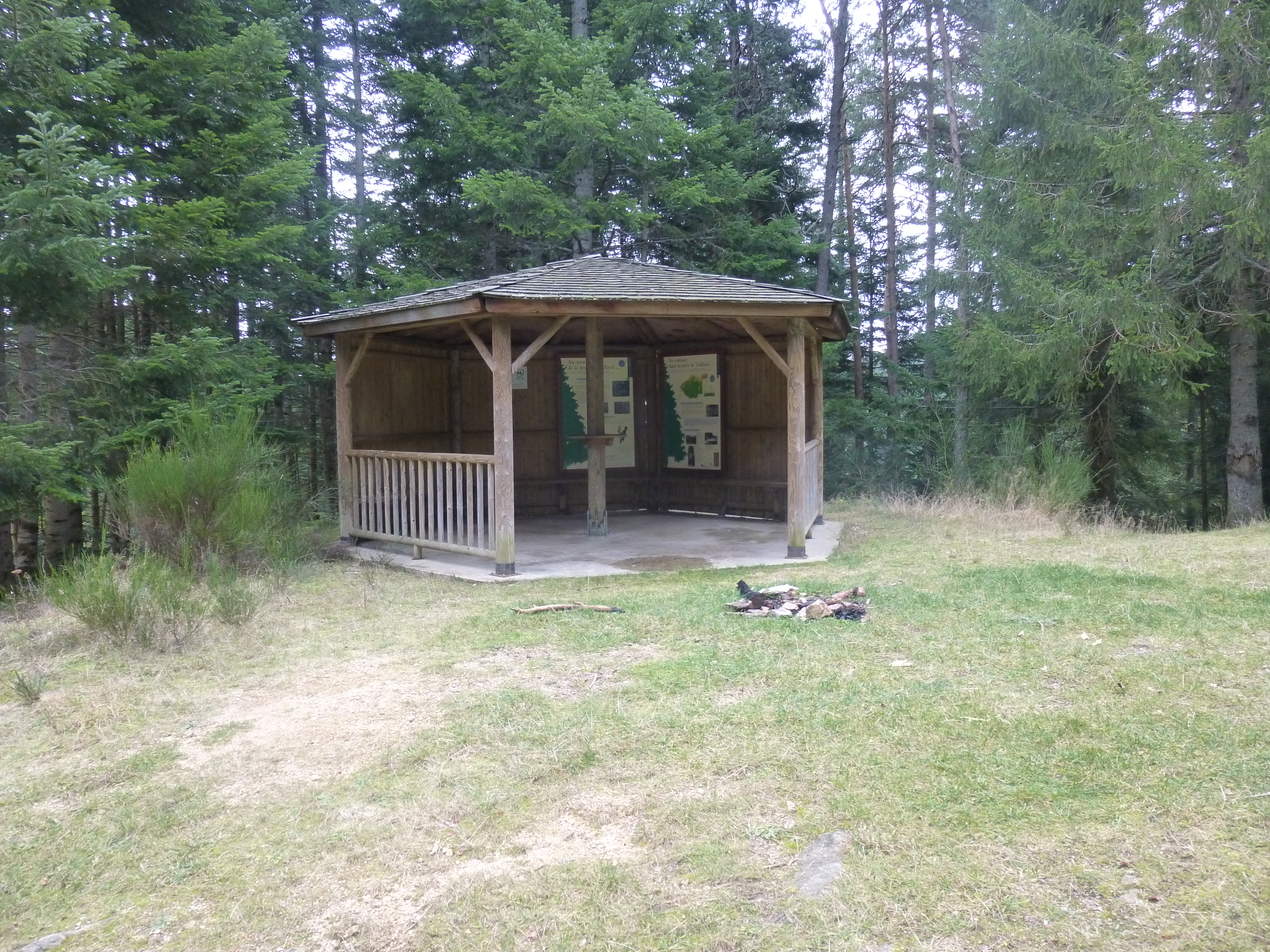 Cabane d'Aiguebelle, accueil des touristes dans la forêt de Taillard.